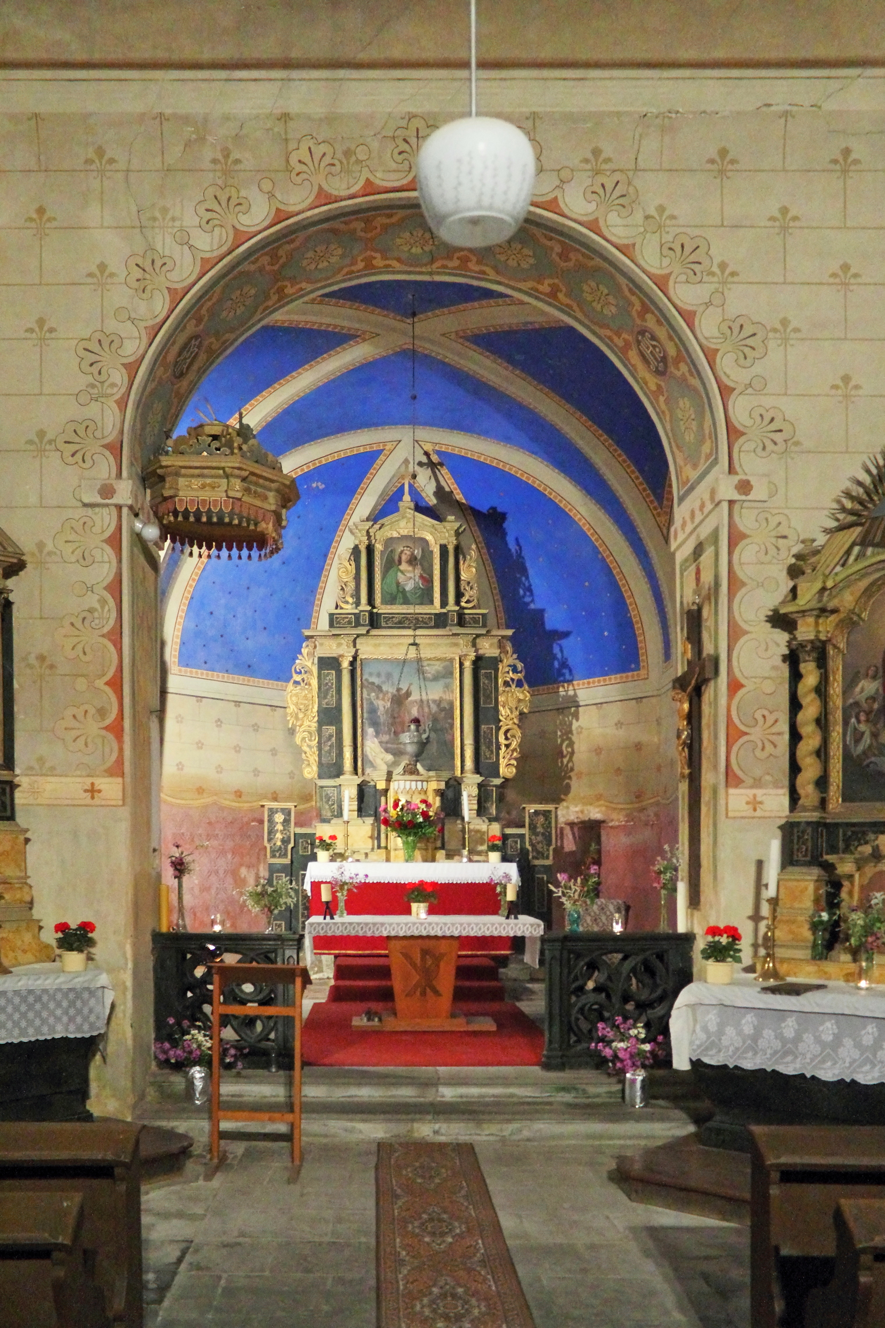 Interiér kostela, Sezemice v okrese Mladá Boleslav